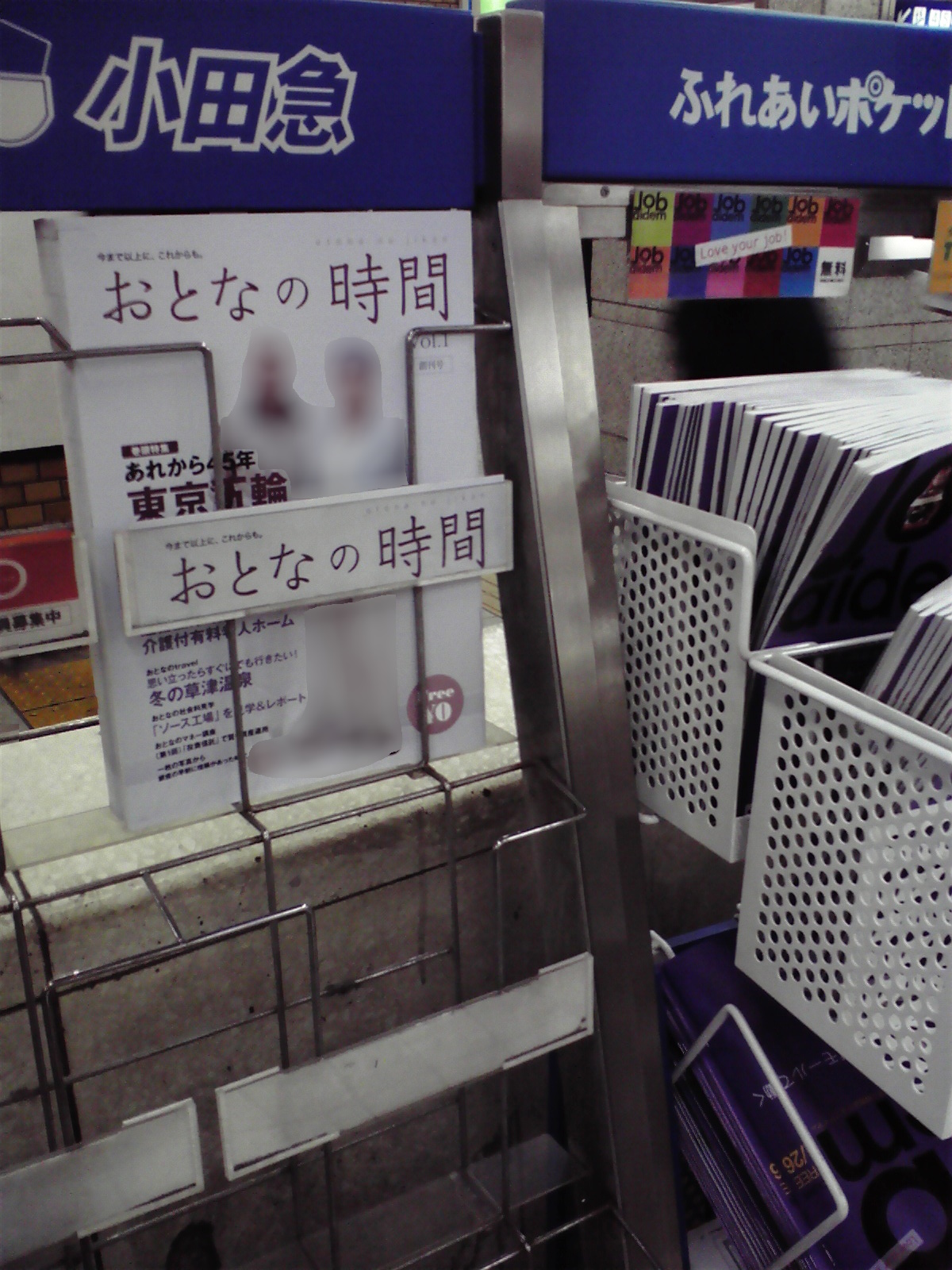 小田急線新宿駅構内ラックに設置された「おとなの時間」